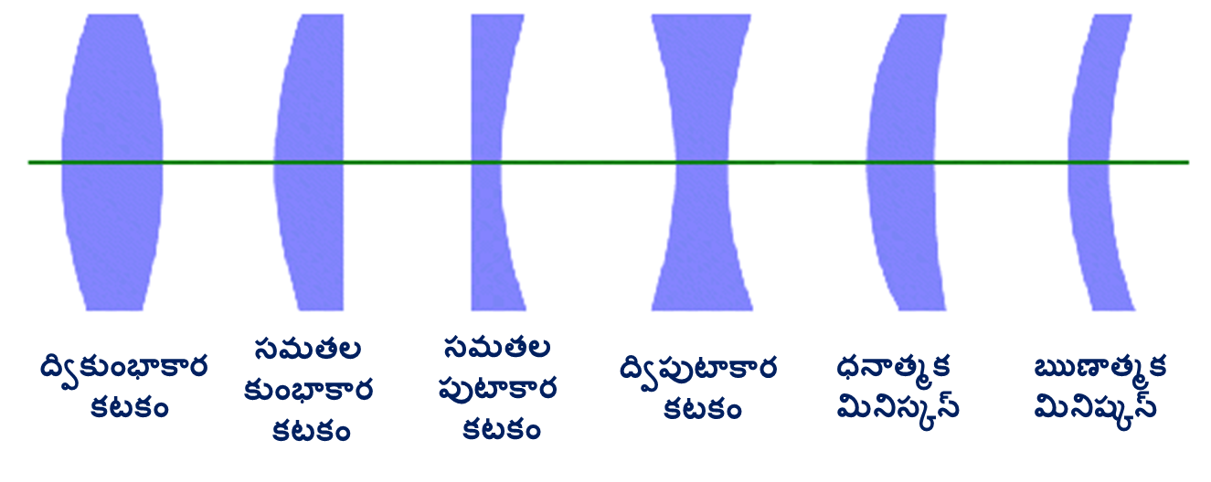 కటకాలలో రకాలు